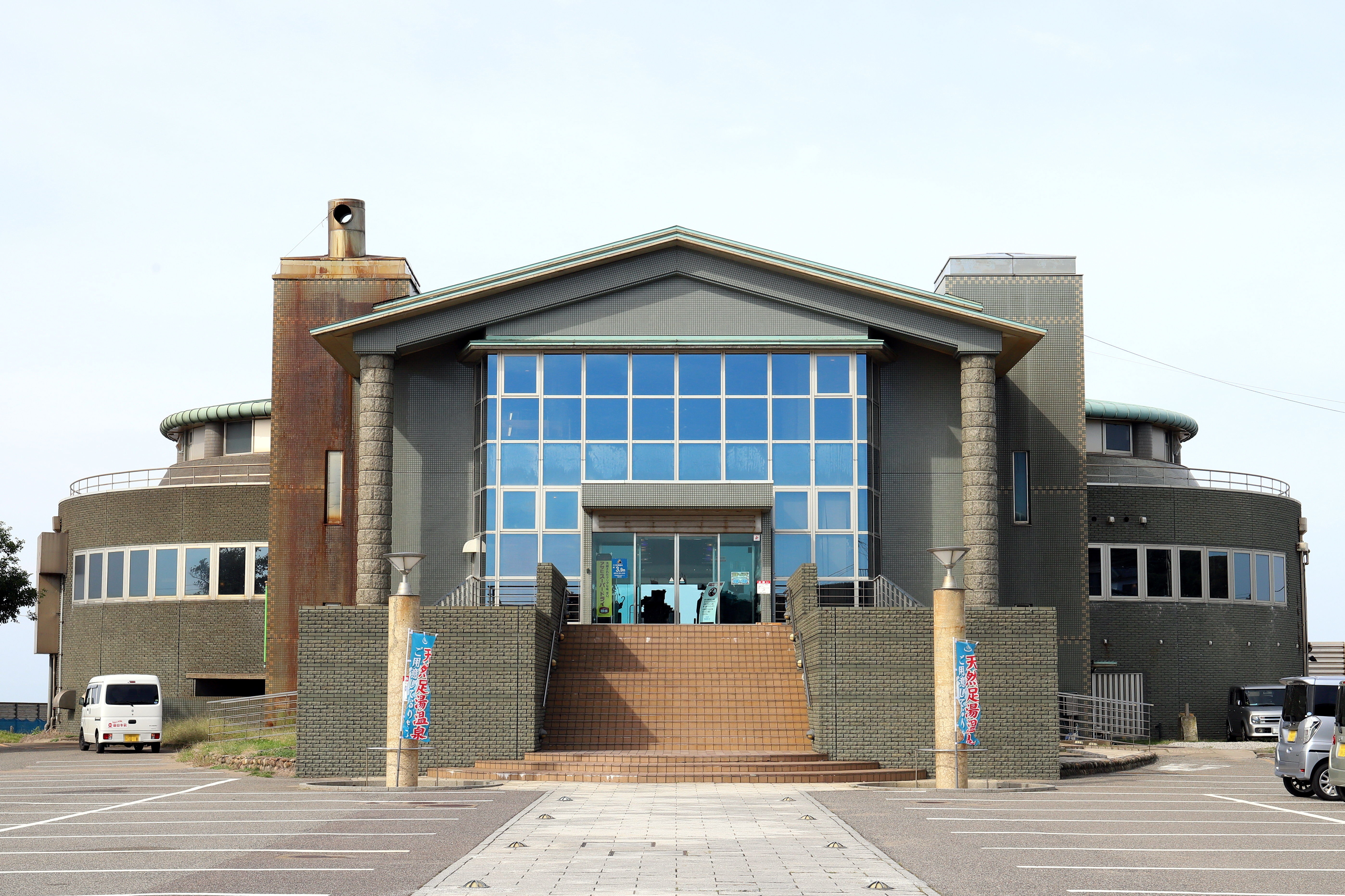 日帰り温泉施設「ゆあぽーと」